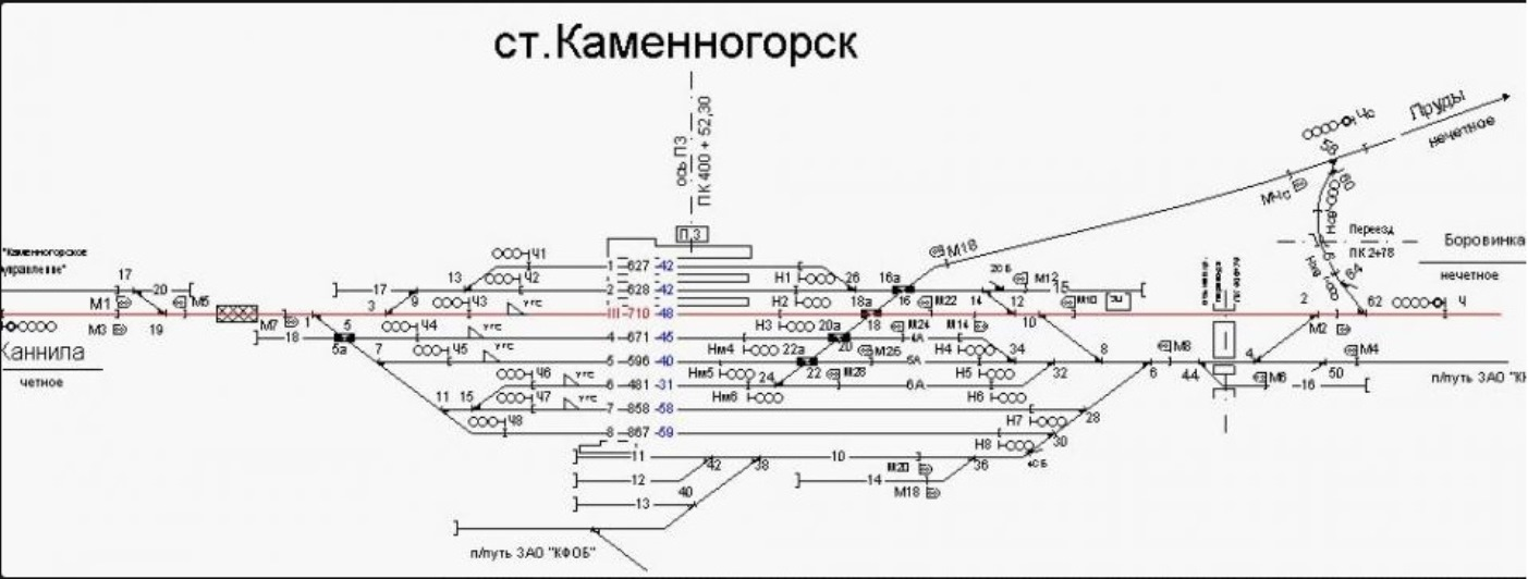 Схема Каменогорска.